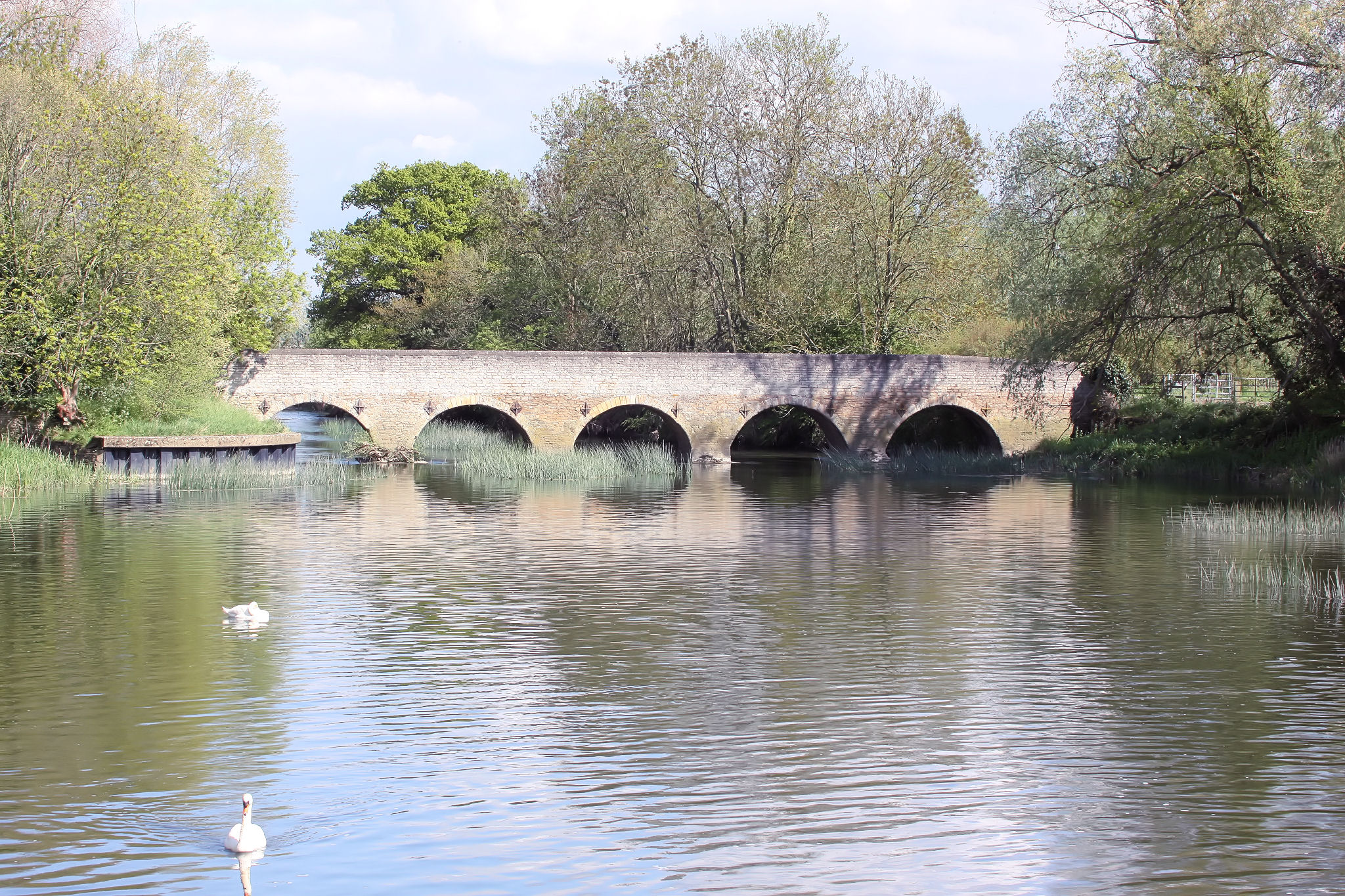 Oakley Bridge